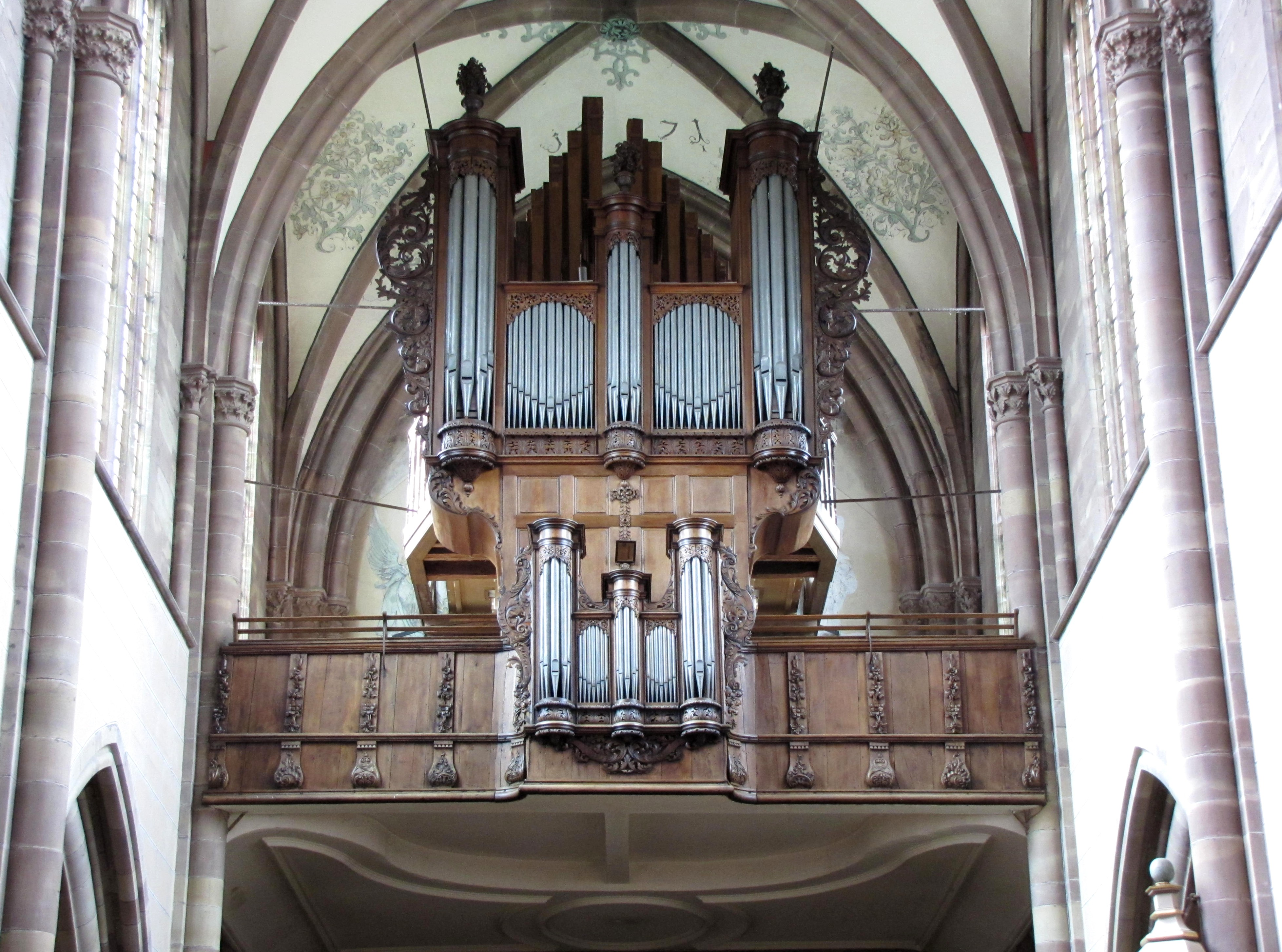 Alsace, Bas-Rhin, Abbatiale Saint-Étienne de Marmoutier (PA00084783, IA67007715). Orgue Andreas et Johann-Andreas Silbermann (1710-1746): This object is classé Monument Historique in the base Palissy, database of the French furniture patrimony of the French ministry of culture, under the references PM67001051 and IM67011808. This object is classé Monument Historique in the base Palissy, database of the French furniture patrimony of the French ministry of culture, under the references buffet + garde-corps PM67000163 buffet + garde-corps and instrument PM67000161 instrument.